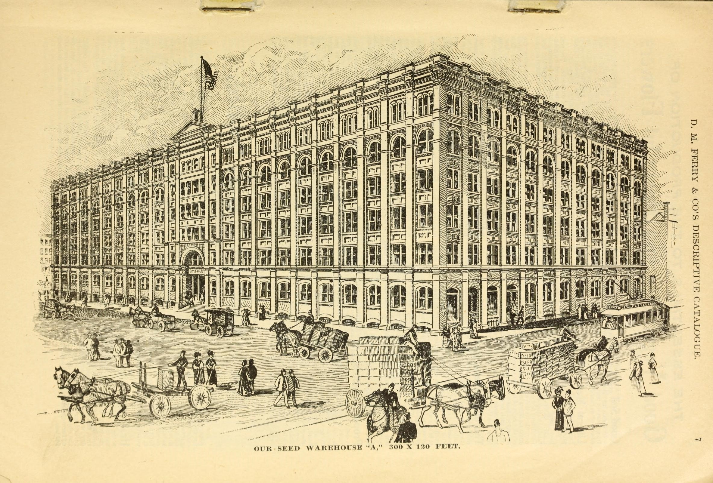 D. M. FERRY & GO'S DESCRIPTIVE CATALOGUE.